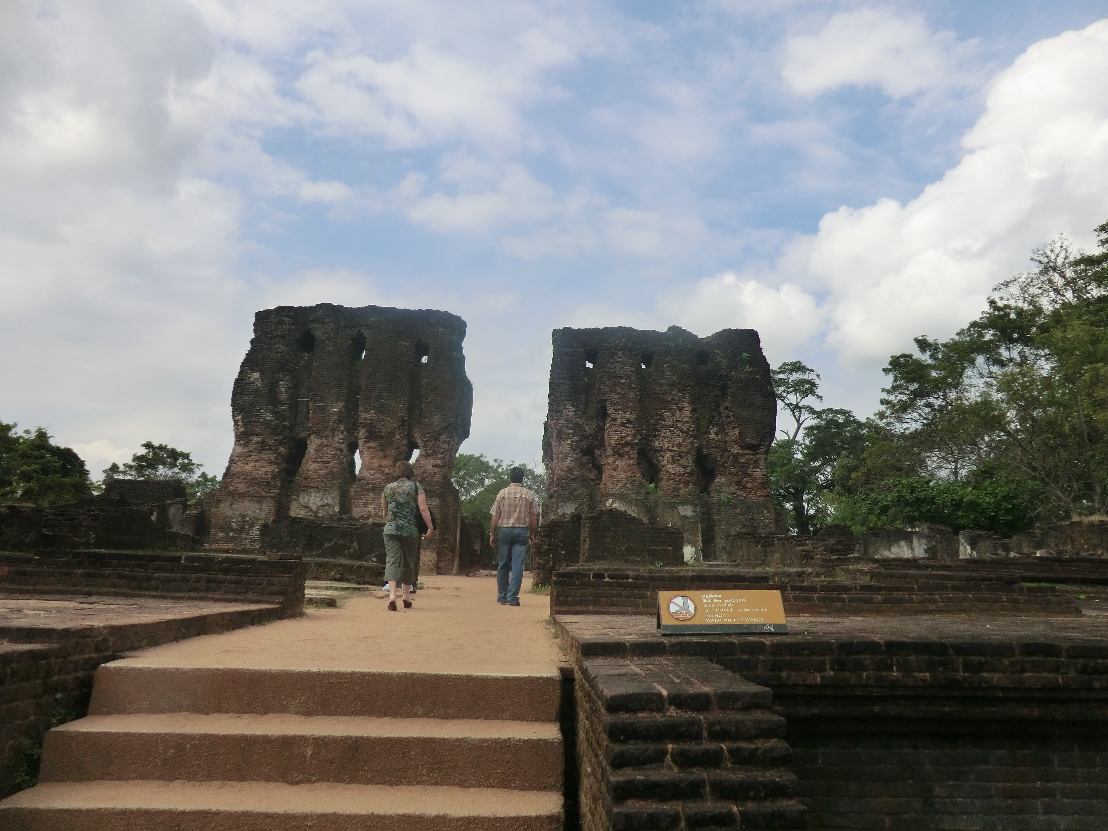 The Palace of King Parakramabahu, Polonnaruwa, Sri Lanka